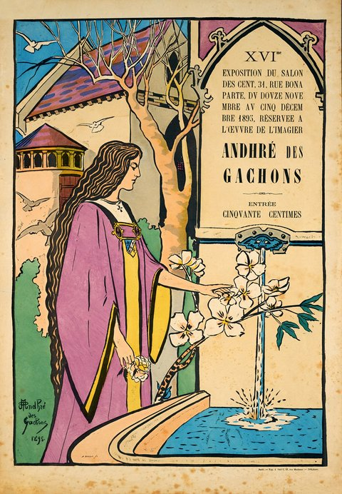 Salon des Cents 1895 Andrhé des Gachons